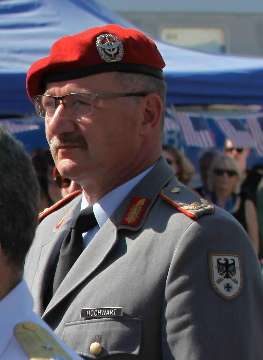 Brigadegeneral_Michael Hochwart, Armed Forces Day 2017 at the Allied Museum in Berlin